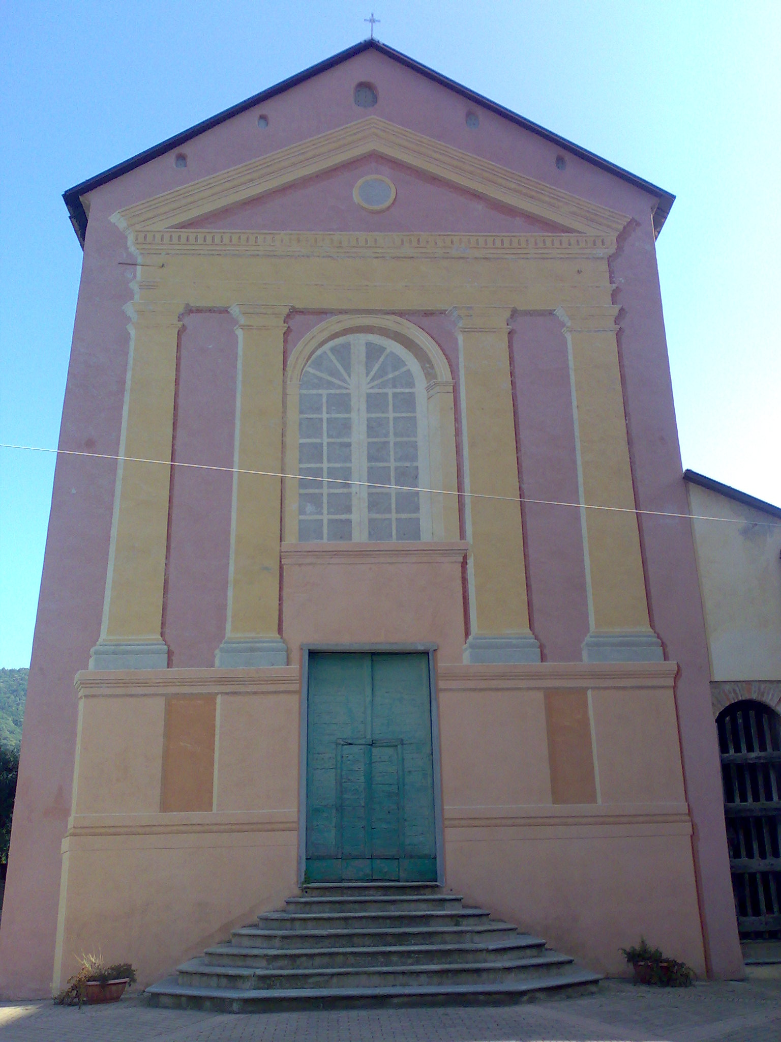 Oratorio di Santa Margherita nella frazione di Segno del comune di Vado Liguire